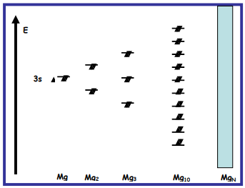 Magnesioaren banda diagrama